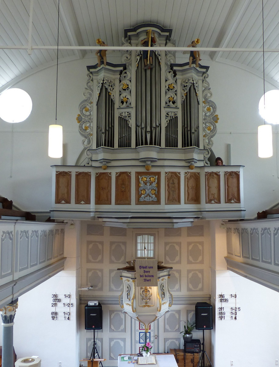 Kirchenschiff Kirche Dhünn - Innenansicht mit Orgel